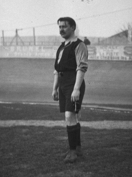 Léon Dubly, joueur de football du Racing Club de Roubaix Stade Buffalo à Paris, 2 ou 3 janvier 1904 Photographie prise soit lors de : - Eastbourne Old Town FC 4 - 2 RC Roubaix du 2 janvier (source Le Matin du 03/01/1904 Numéro 7252) - RC France 1 - 0 RC Roubaix du 3 janvier (source Le Matin du 04/01/1904 Numéro 7253)